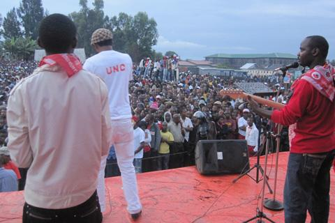 Meeting de masse du candidat Vital Kamerhe à Goma, RDC (Novembre 2011)